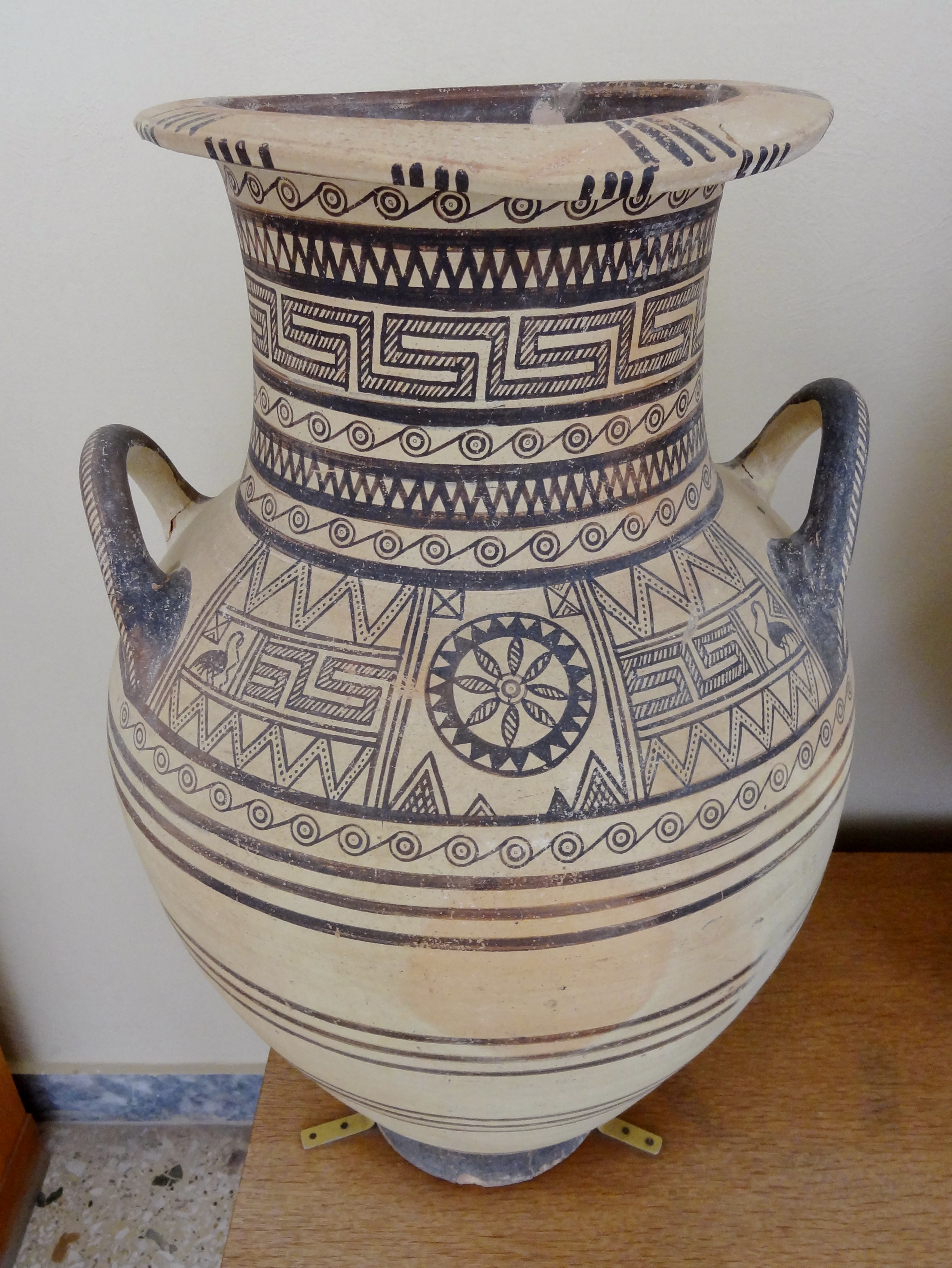 Amphore (8.–7. Jahrhundert v. Chr.) vom Friedhof von Alt-Thera (Santorin) im Archäologischen Museum in Fira, Santorin (Thira), Kykladen, Griechenland